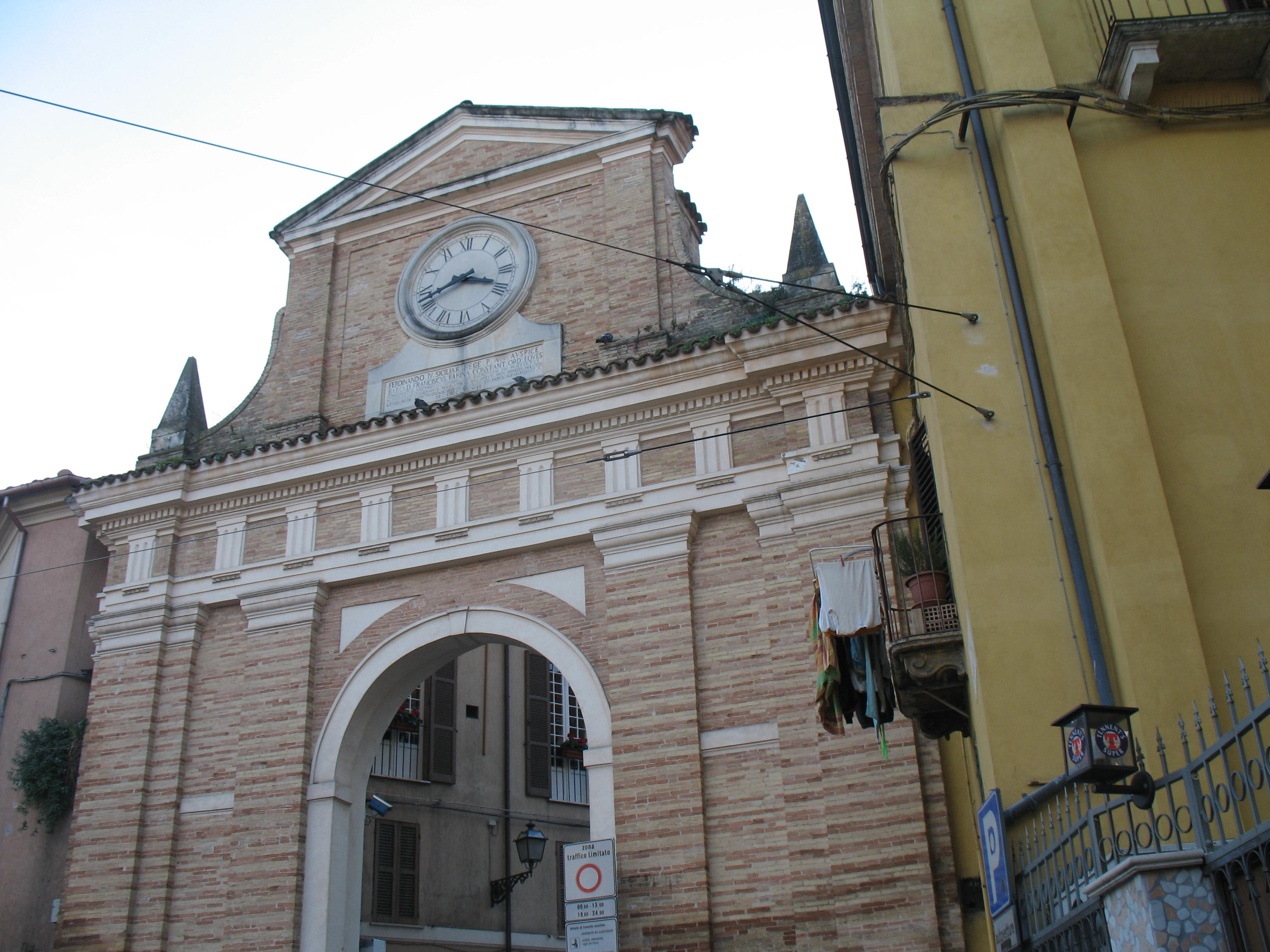 Parte di ciò che rimane delle antiche mura che circondavano Chieti